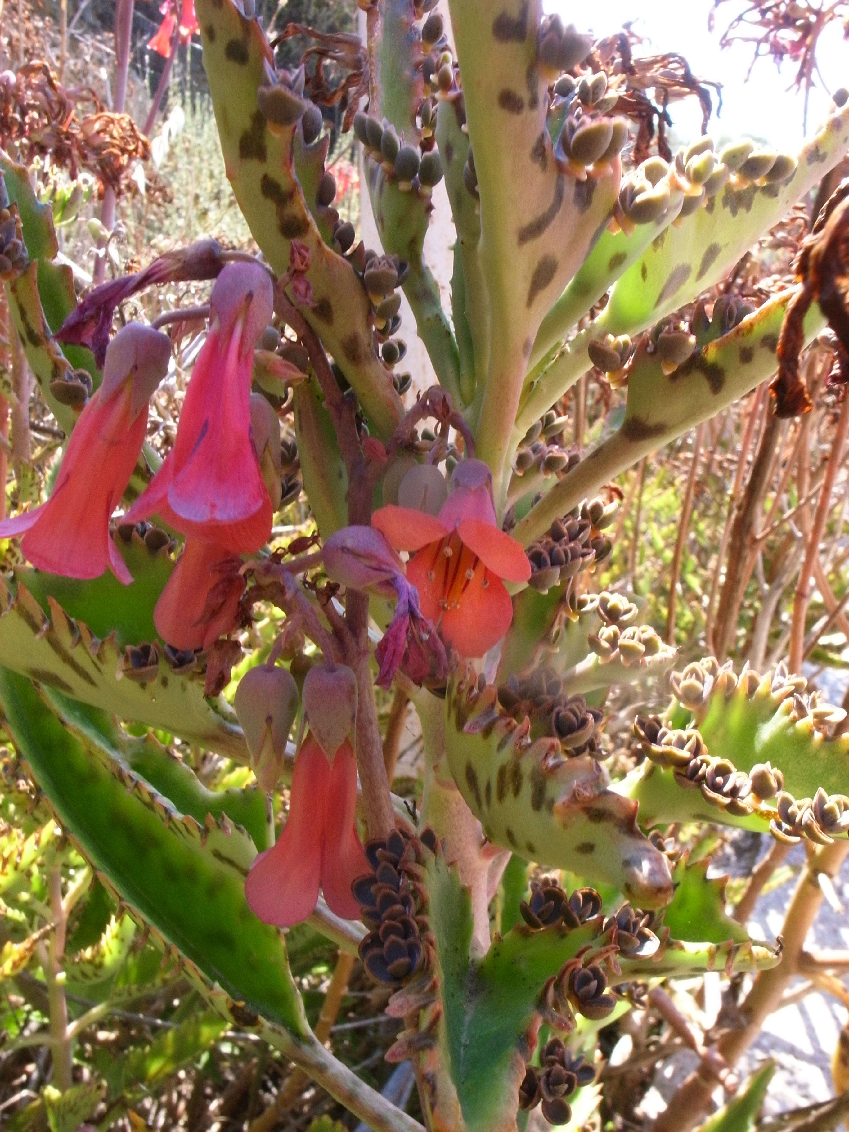 Kalanchoe daigremontiana rural in Sos Alinos, Nuoro province, Sardegna, Italy